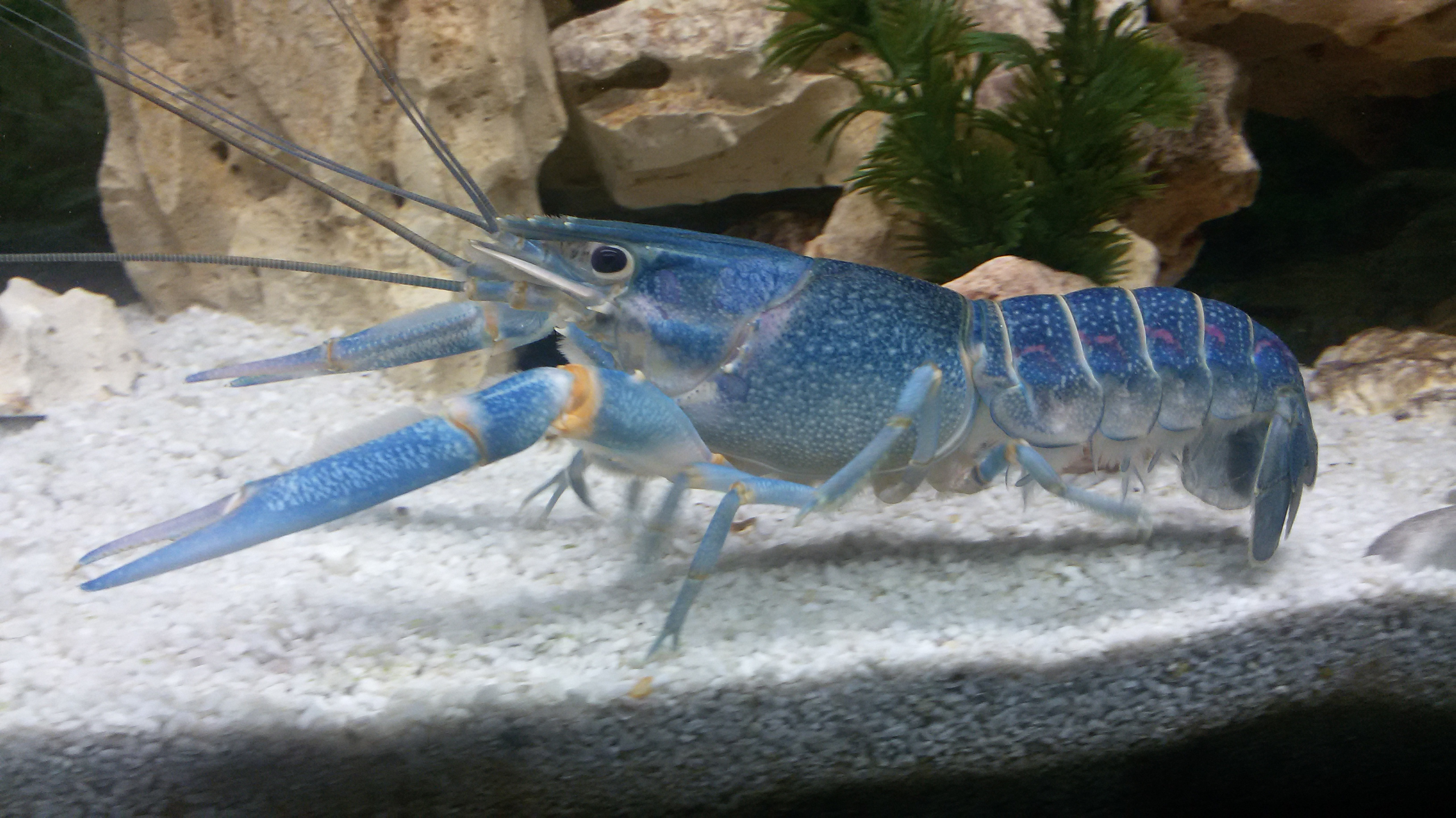 Notte esteso